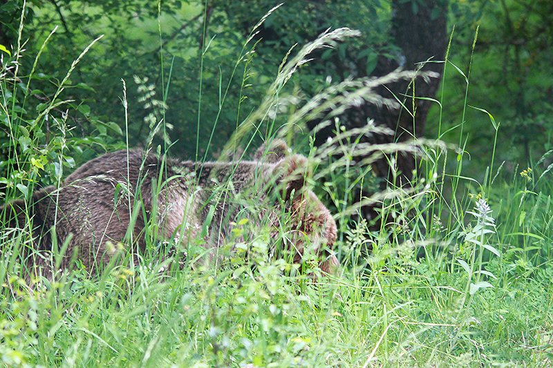 Scatto personale prelevato dal sito ( per la valutazione del territorio Marsicano )